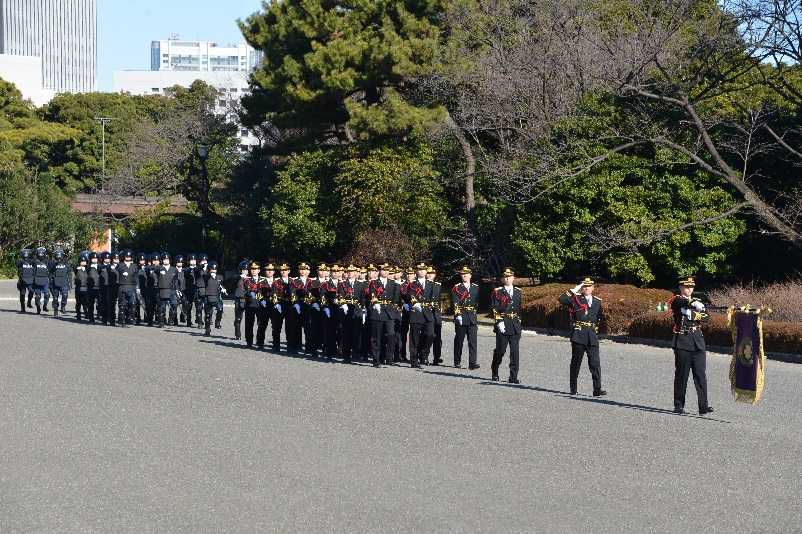 平成28年皇宮警察年頭視閲式で行進する皇宮警察本部特別警備隊。